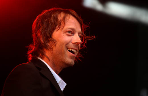 Magnet (Even Johansen) during 'Skral Festival' in Grimstad, Norway